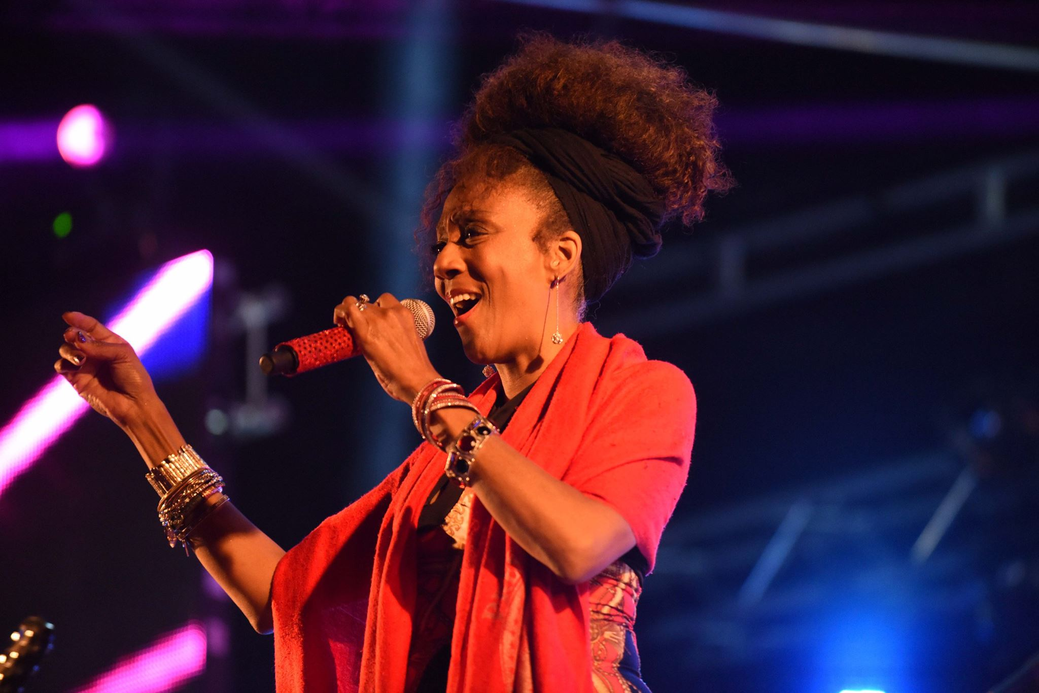 Joniece Jamison Vesoul 2 septembre 2016